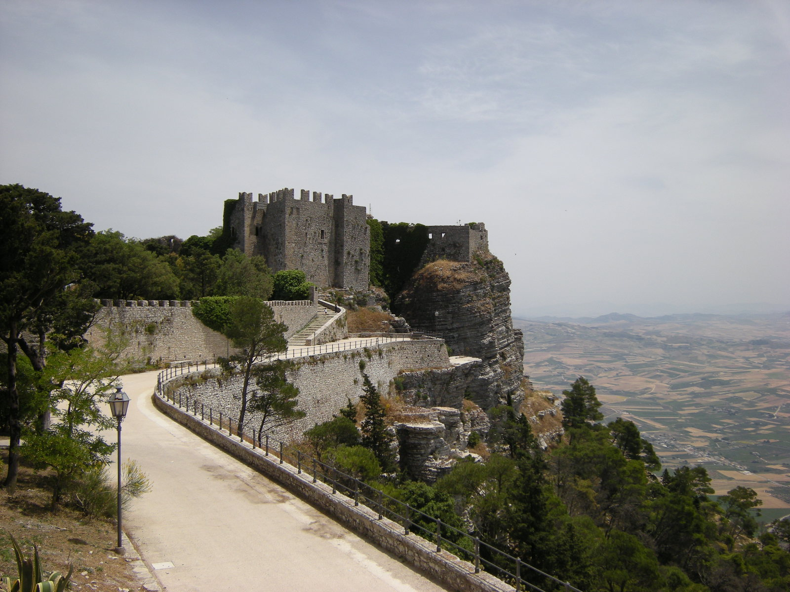 Castelo de Erice é uma a pequena cidade medieval situada no alto da montanha homônima. Província de Trapani. Sicilia Castello di Venere